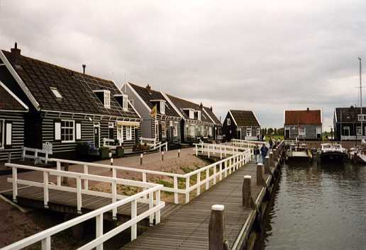 Haven van Marken; eigen foto